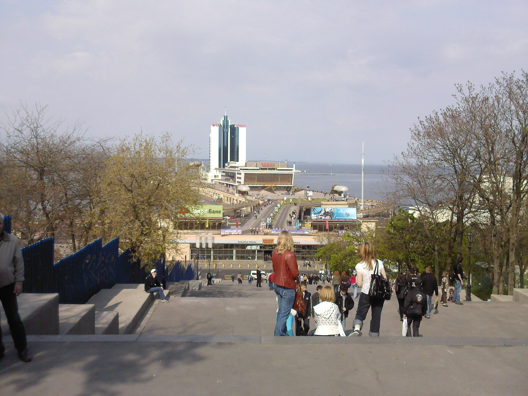 В XIX столітті називались - Гігантські сходи, тепер - Потьомкінські сходи